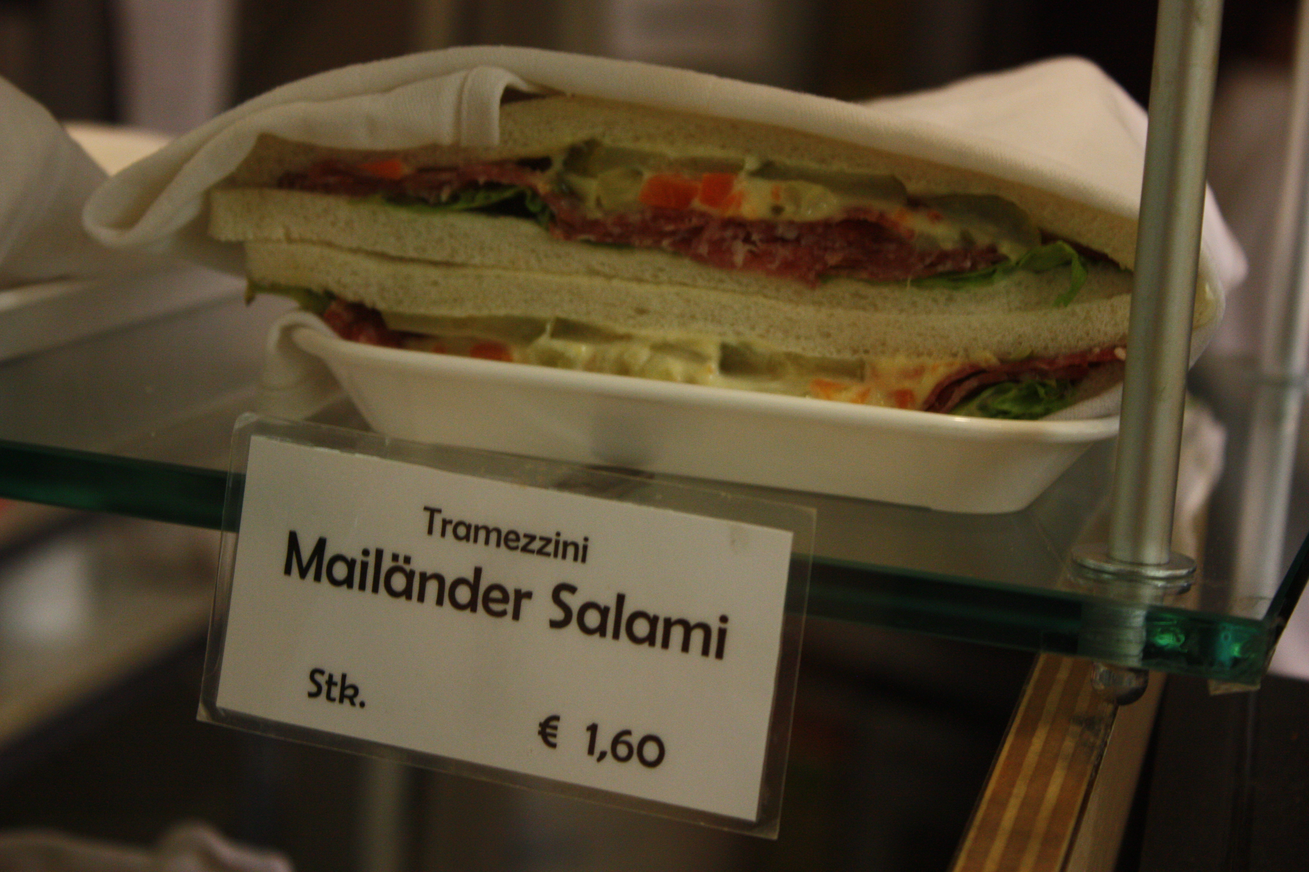 Tramezzini, Wien, Vienna